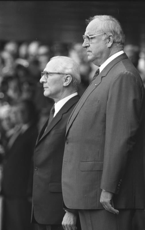 ADN-ZB, Oberst 7.9.87 - BRD: Honecker-Besuch Nach der Begrüßung des Generalsekretärs des ZK der SED und Vorsitzenden des Staatsrates der DDR Erich Honecker, durch den Bundeskanzler Helmut Kohl vor dem Bundeskanzleramt in Bonn erklangen die Hymnen der beiden deutschen Staaten.